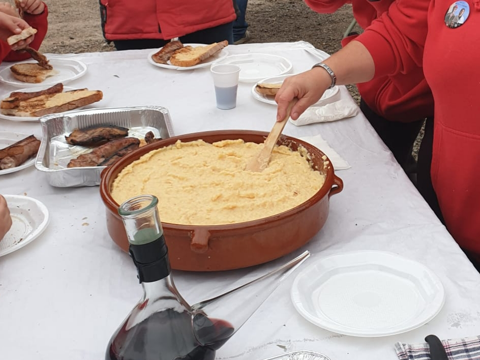 Cassola d'allioli de codony per a la trobada Gegantera de Puig-reig 2019